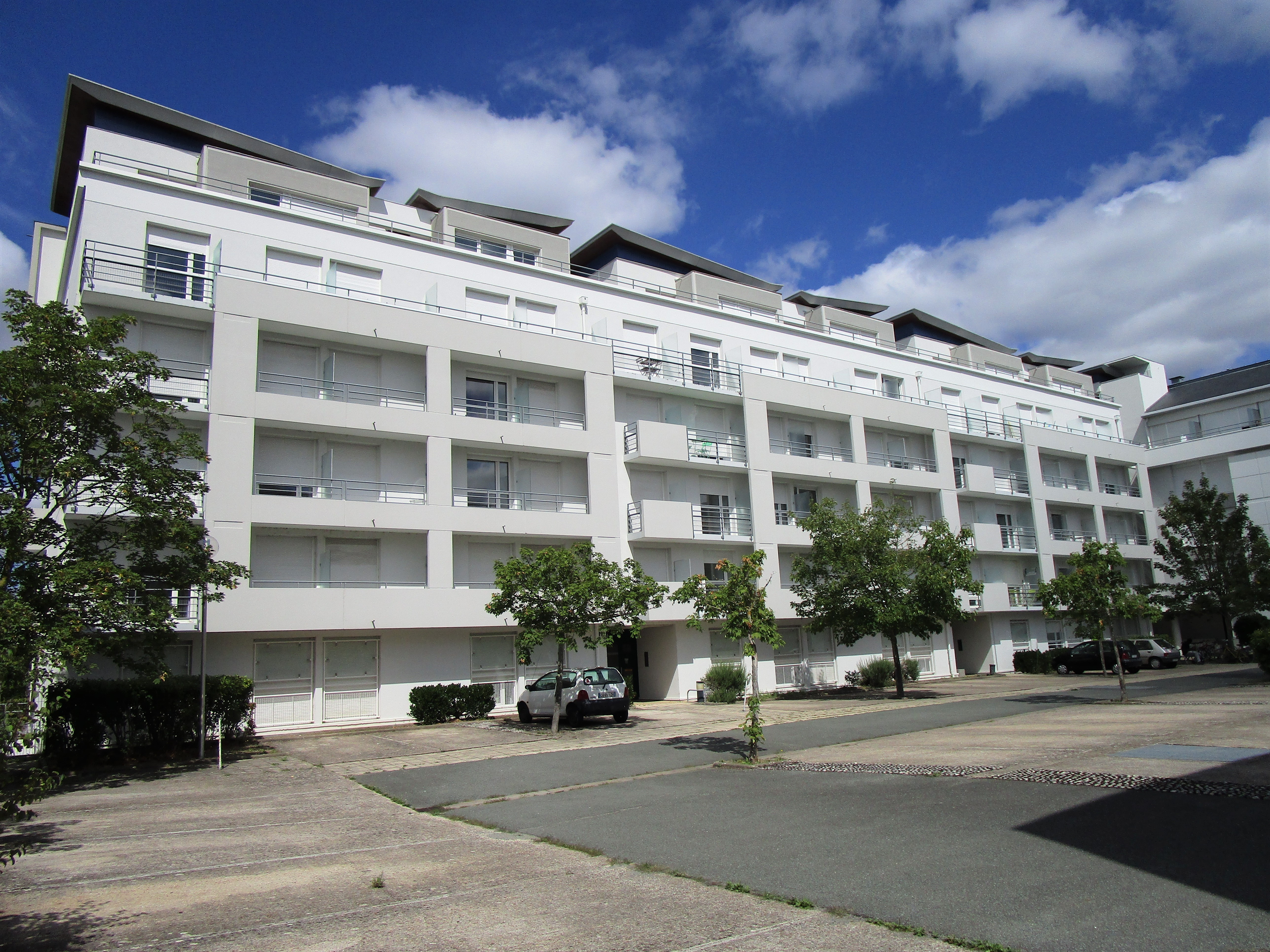 La résidence étudiante du Technopole, dans le quartier des Deux-Lions de Tours. Construit en 1994.